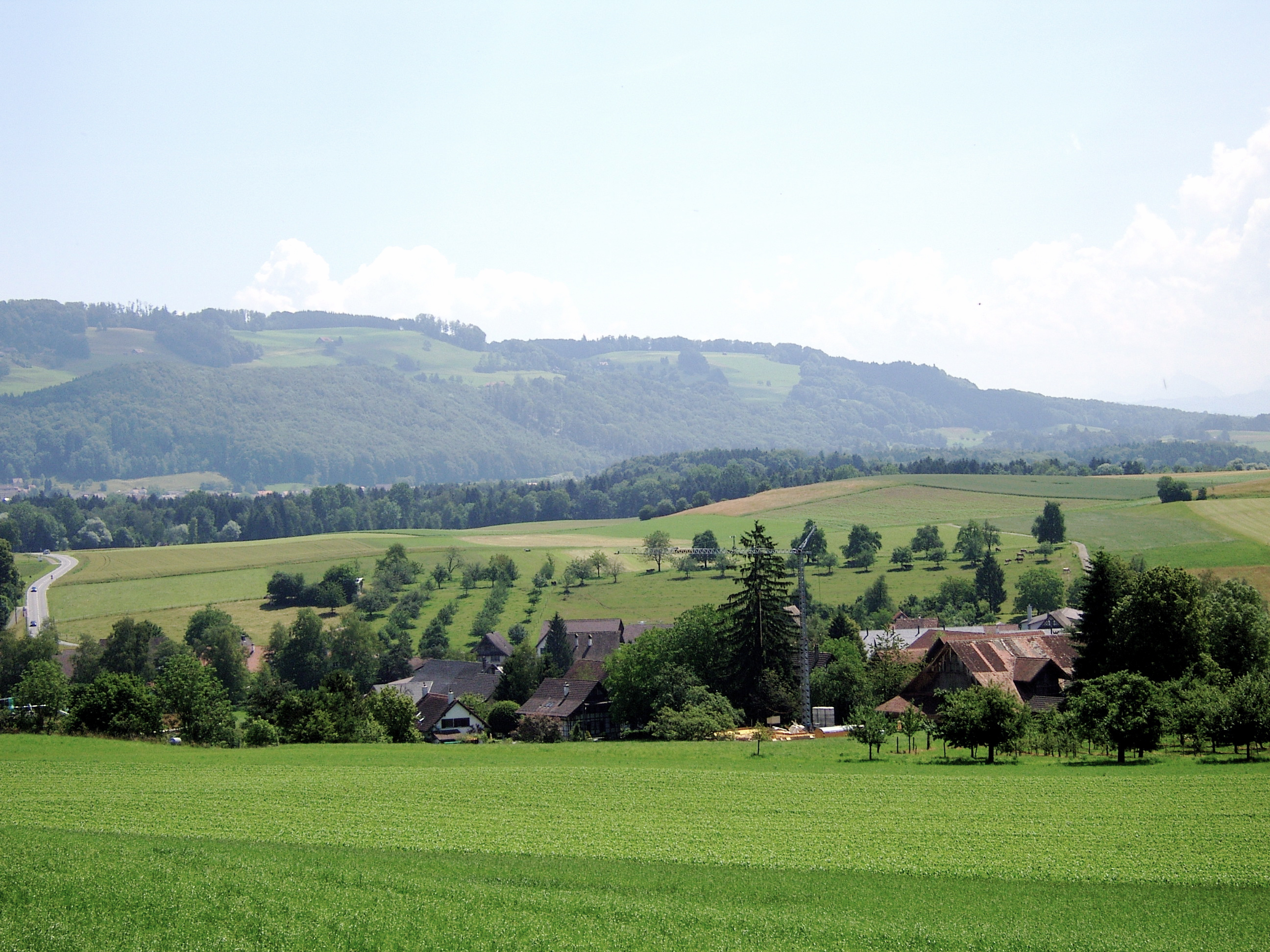 Unter-Rifferswil. Blick vom Waldrand unter dem Homberg.